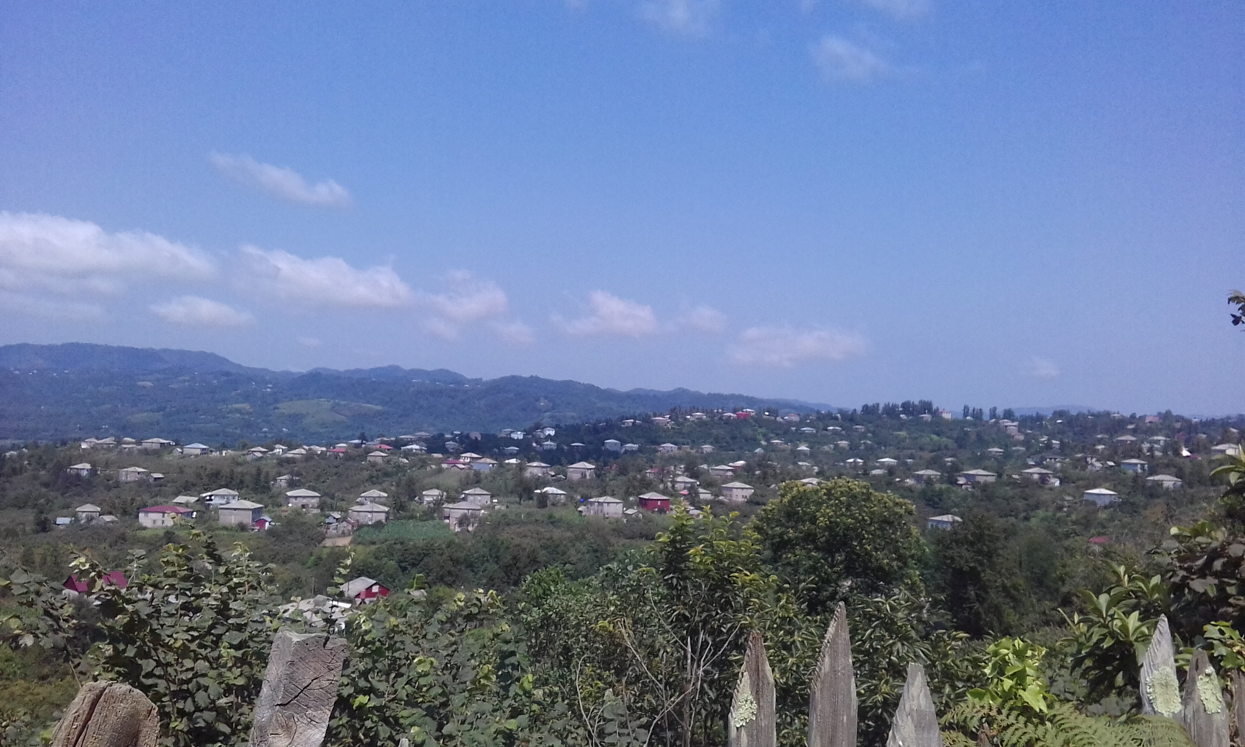 ეს ნასაკირალის დასავლეთი მხარეა